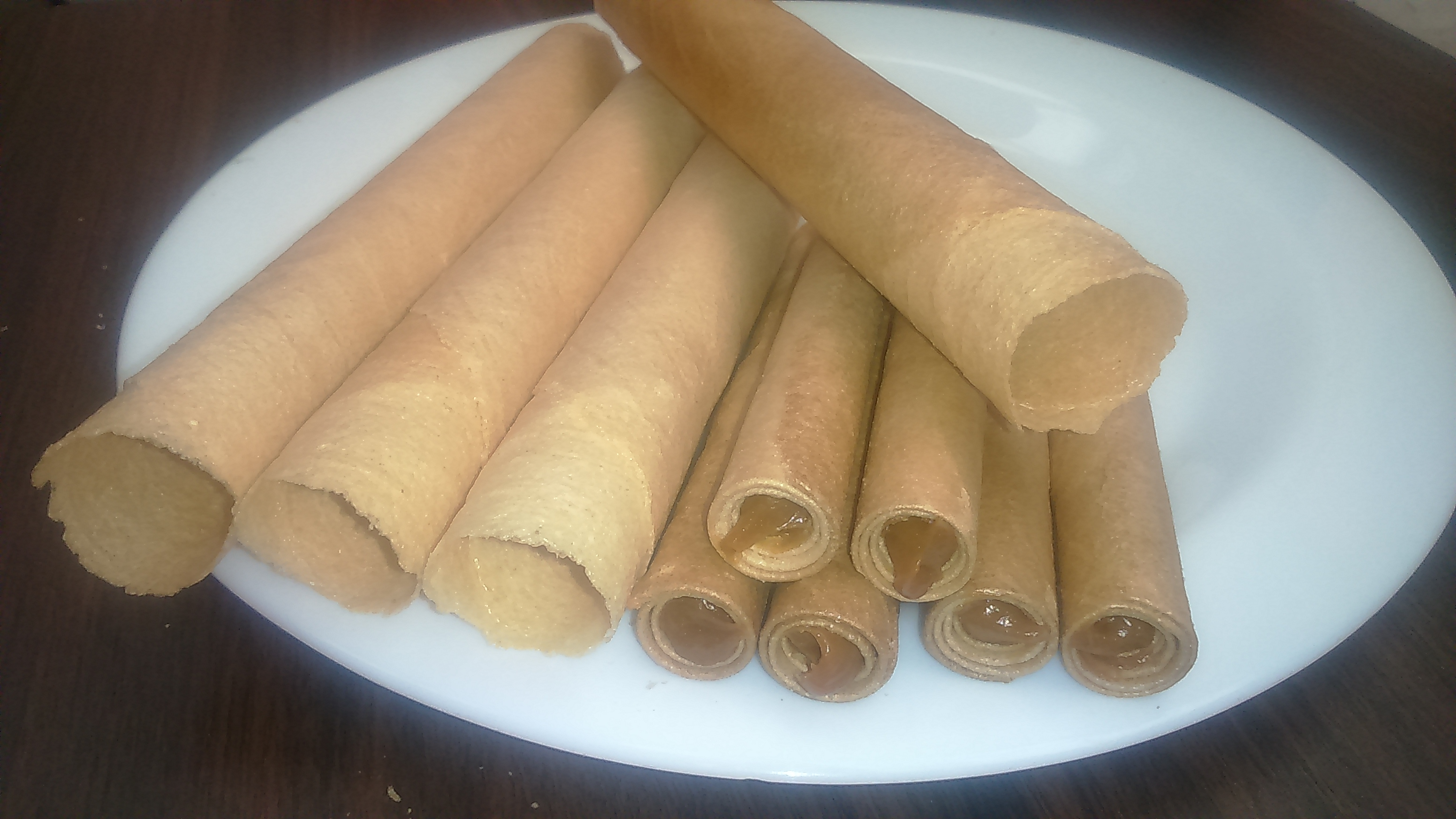 cuchuflis rellenos con manjar, a un costado Barquillos artesanales.